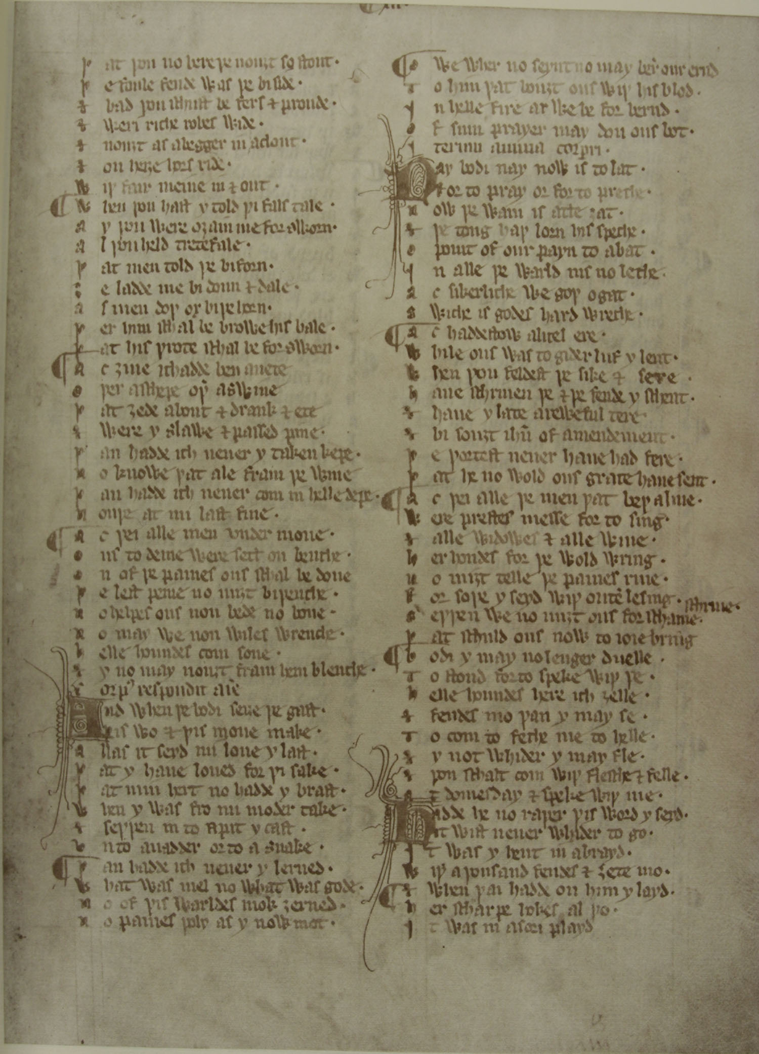 Auchinleck manuscript, folio 34r.